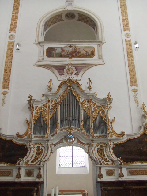 Ursberg, Klosterkirche, Chororgel